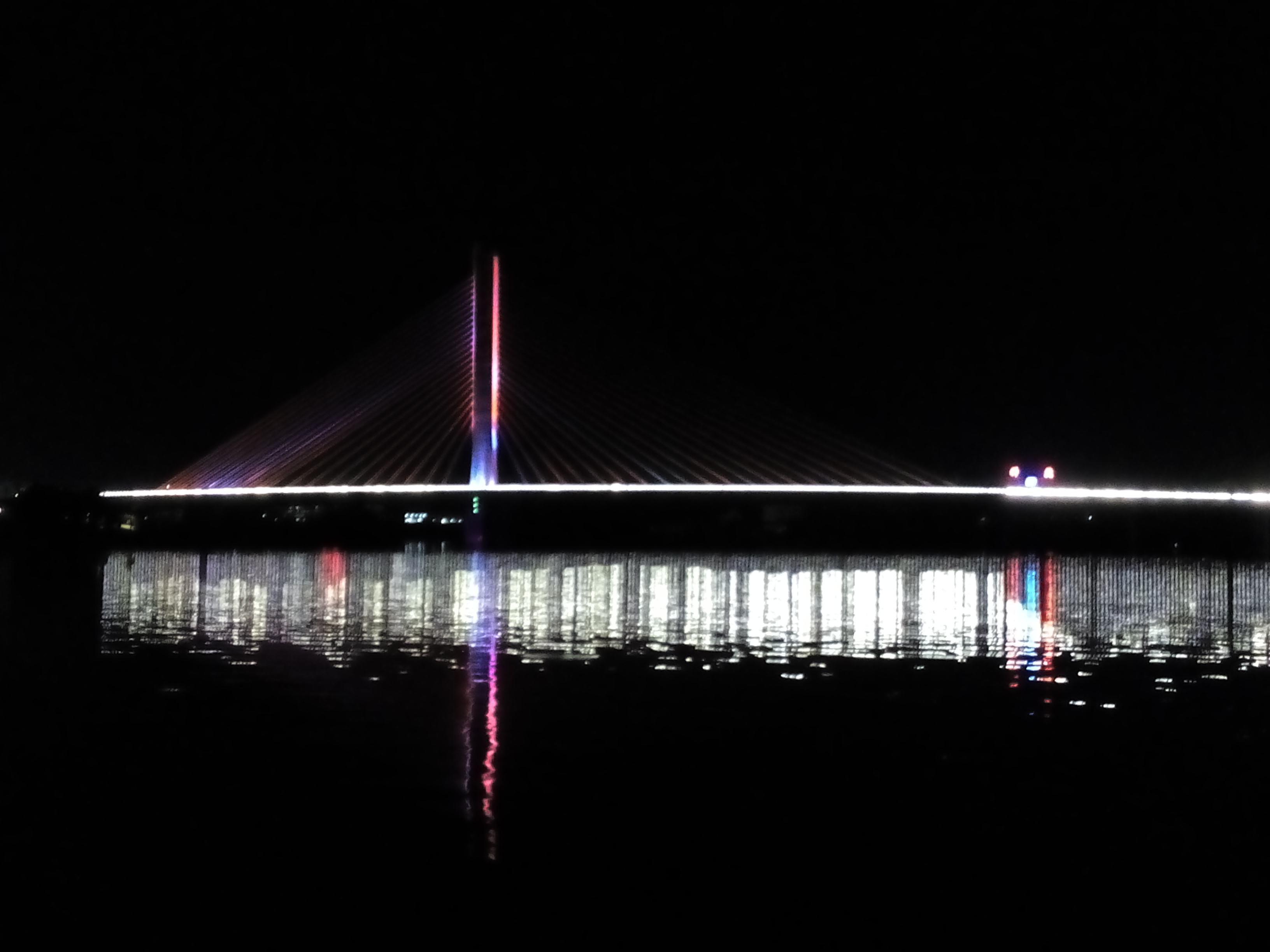 中文（中国大陆）: 在梅州归读公园所拍的广州大桥夜景